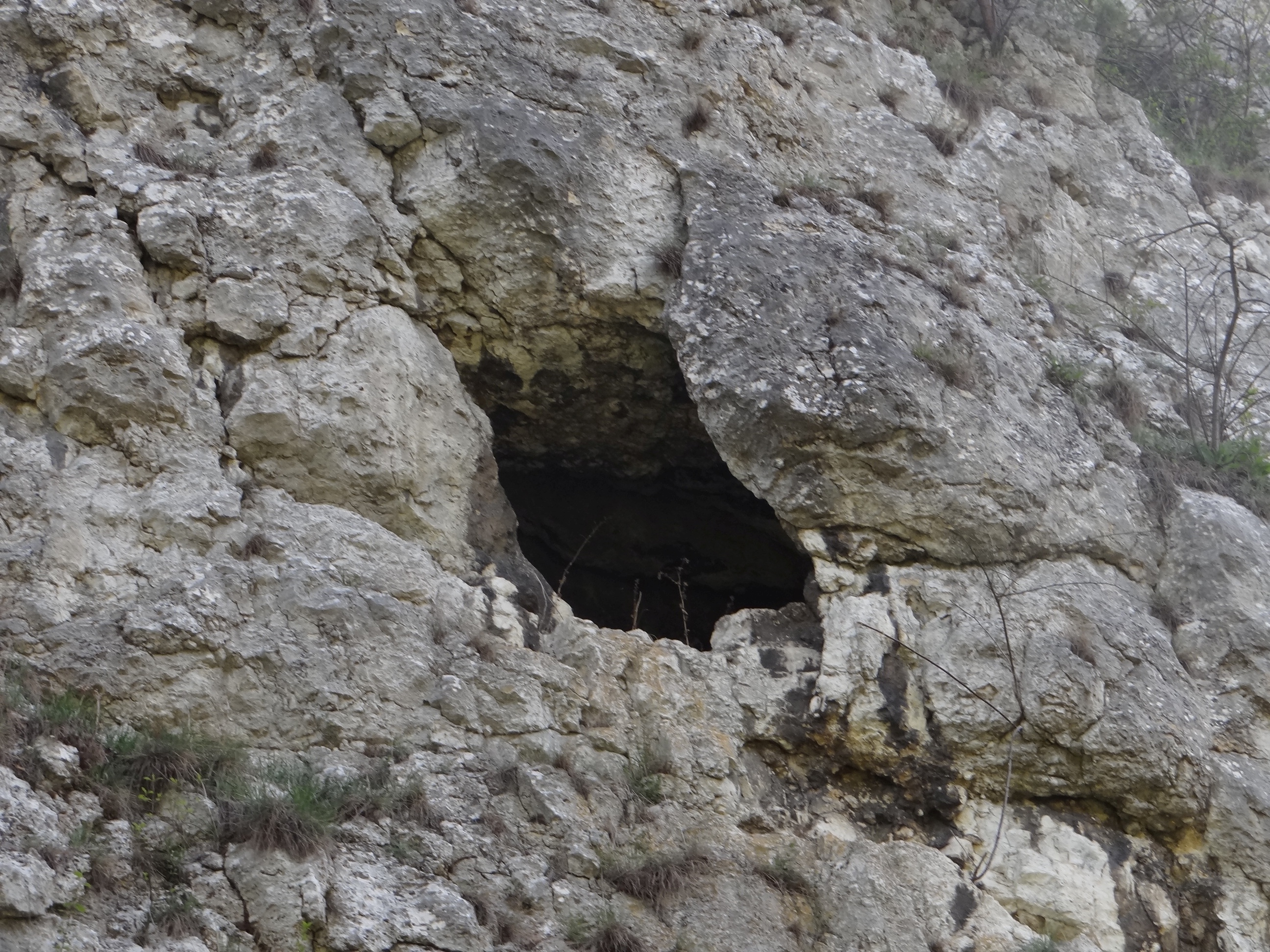 Okno Sokole I w Turni z Grotami w Dolinie Bolechowickiej